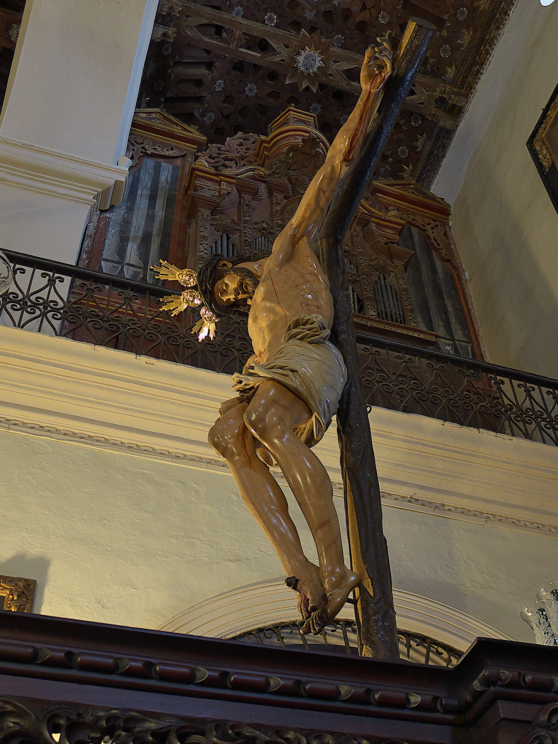 Iglesia Mayor Parroquial de Nuestra Señora de la O, Sanlúcar de Barrameda. Titular de la Muy Antigua, Real e Ilustre Hermandad del Santísimo Cristo de la Vera-Cruz y Nuestra Señora de la Soledad en los Misterios Dolorosos del Santo Rosario. La talla, en madera de cedro, al no estar documentada, es atribuible por todos, a Francisco de Ocampo y Felguera (1615-1617), o a su taller.